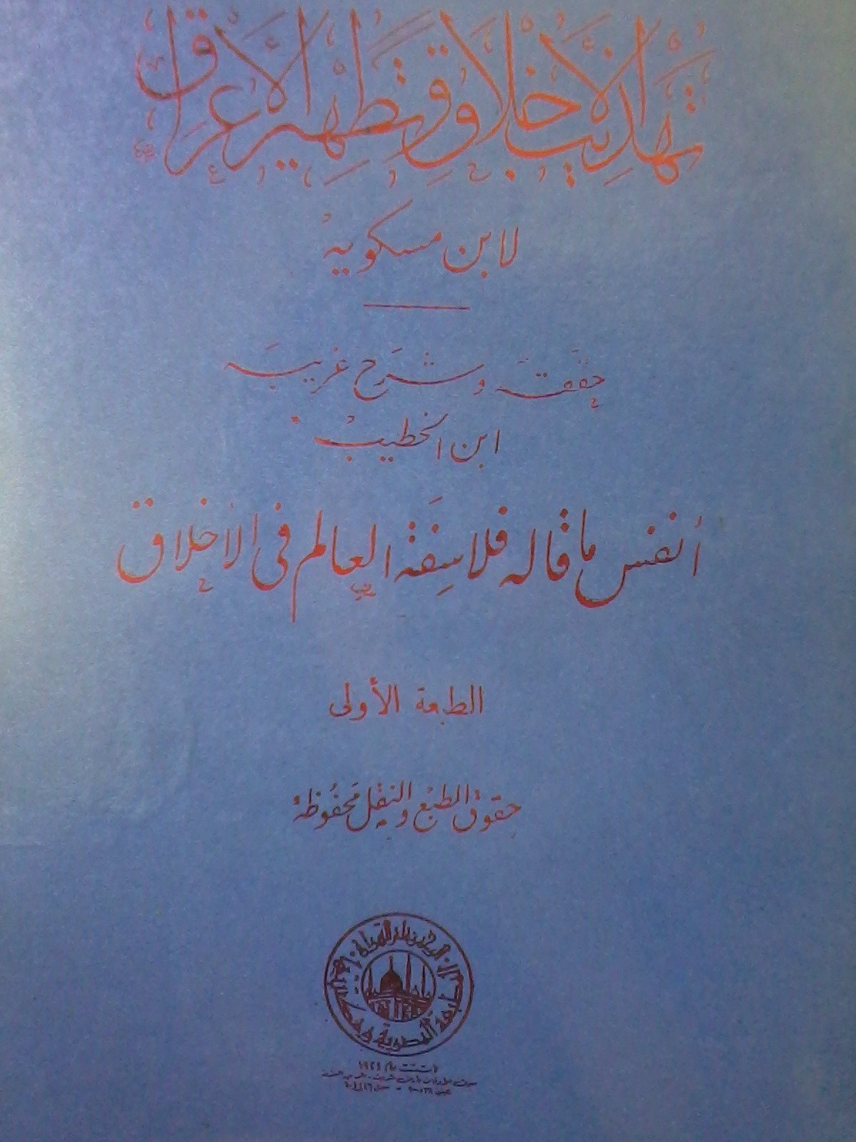 Tahdzibul achlaq wa tathhirul a'raaq merupakan karya terkenal milik Ibnu Miskawaih